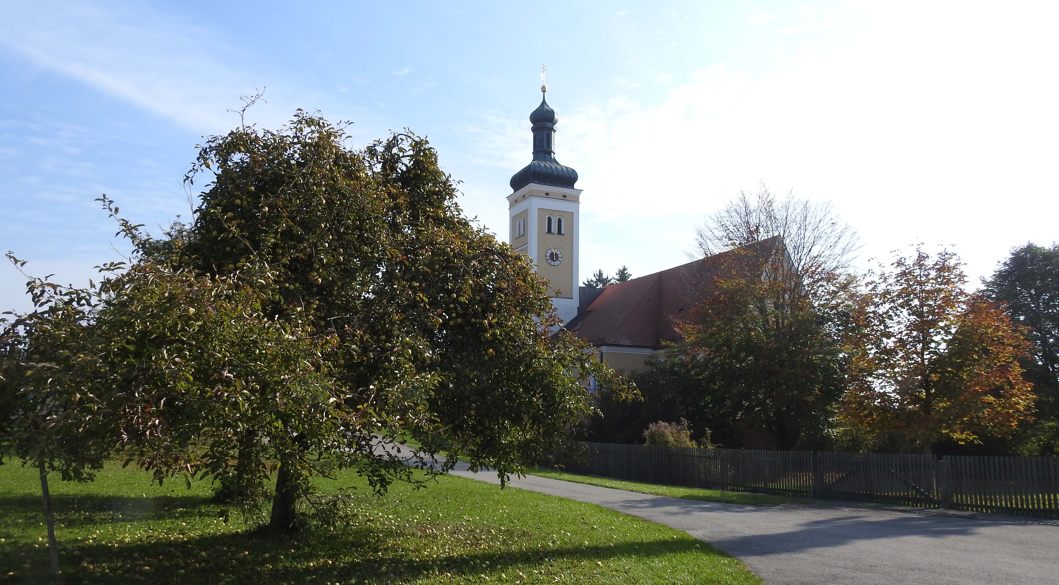 Kirche in Egenhofen